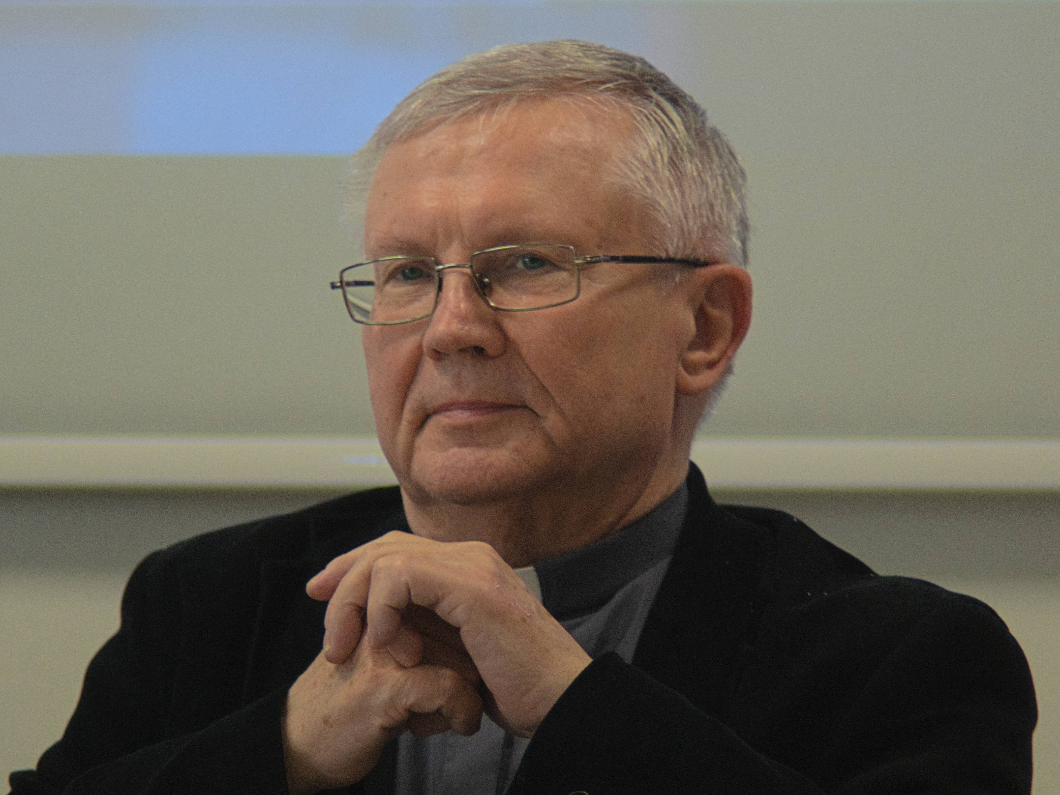 Jerzy Myszor (born 1950), Polish Roman Catholic priest. Photograph taken during open discussion connected with book promotion (title of the book: Relacje Kościół – państwo na Górnym Śląsku w latach 1945–1989. Konflikt ideologiczny) at Educational Centre of Institute of National Remembrance (Polish. Przystanek Historia Centrum Edukacyjne IPN im. Janusza Kurtyki) in Katowice.